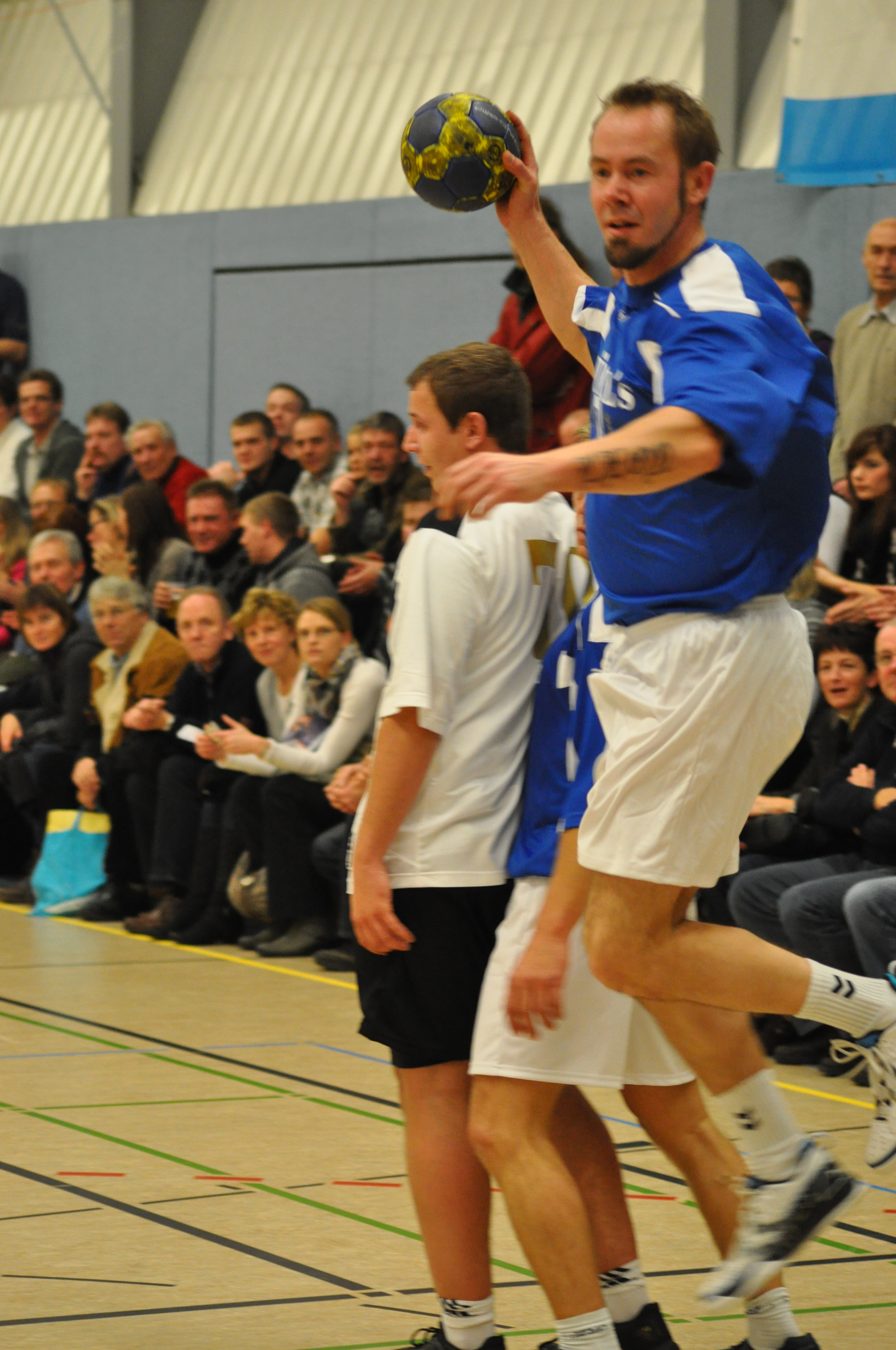 Jean Baruth am 10.12.2010 in der "Sporthalle am Mühlenberg" in Ribnitz-Damgarten bei einem Handballspiel zu Ehren des 70. Geburtstages des langjährigen Physiotherapeuten der (west)deutschen Männer-Handballnationalmannschaft Klaus Bergmeier.